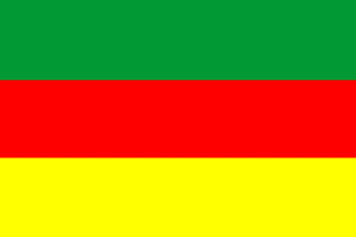 Bandera de la regió Nord-oriental del Marañon